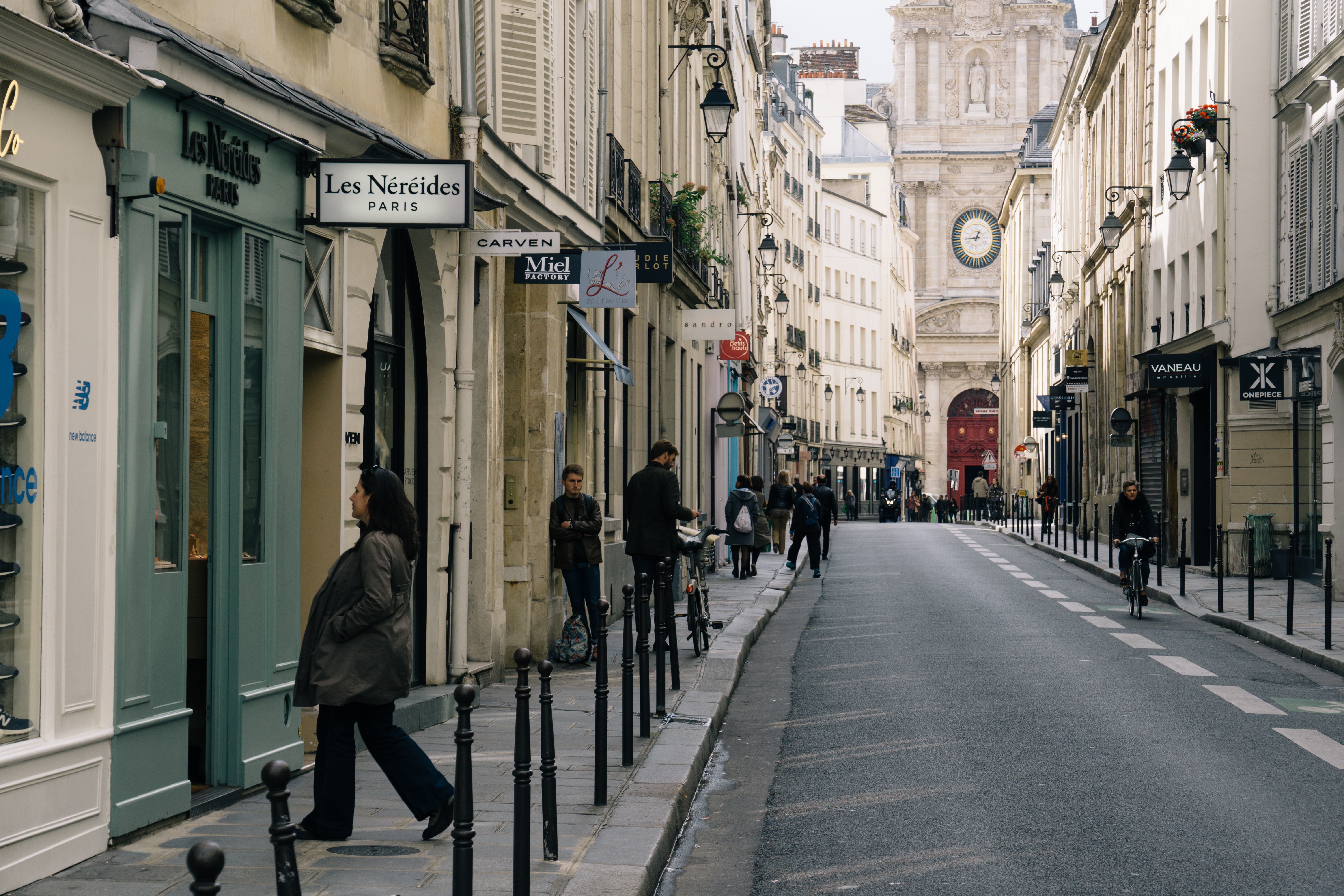 paris-147